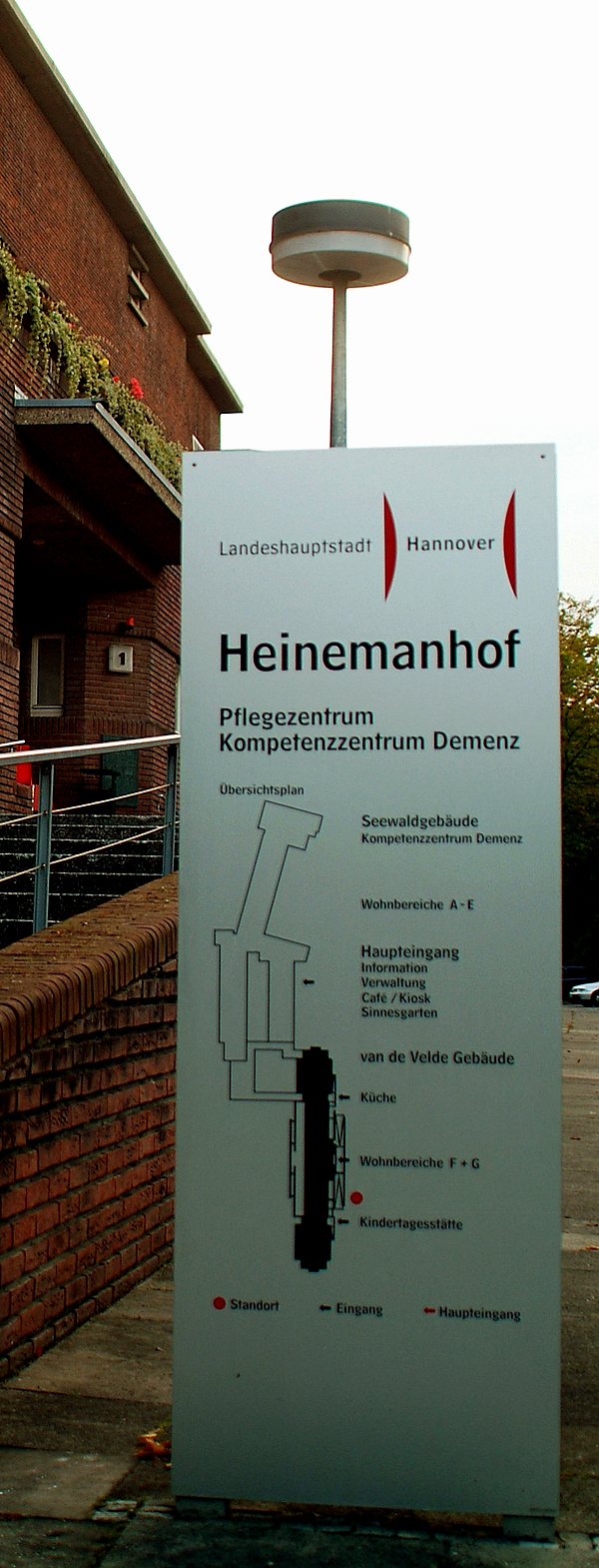 Übersichtsplan mit Erläuterungen neben dem Treppenaufgang zum Heinemanhof mit einer Skizze der Lage auch vom "Seewaldgebäude"; der spätere Anbau dient als "Kompetenzzentrum Demenz" ...